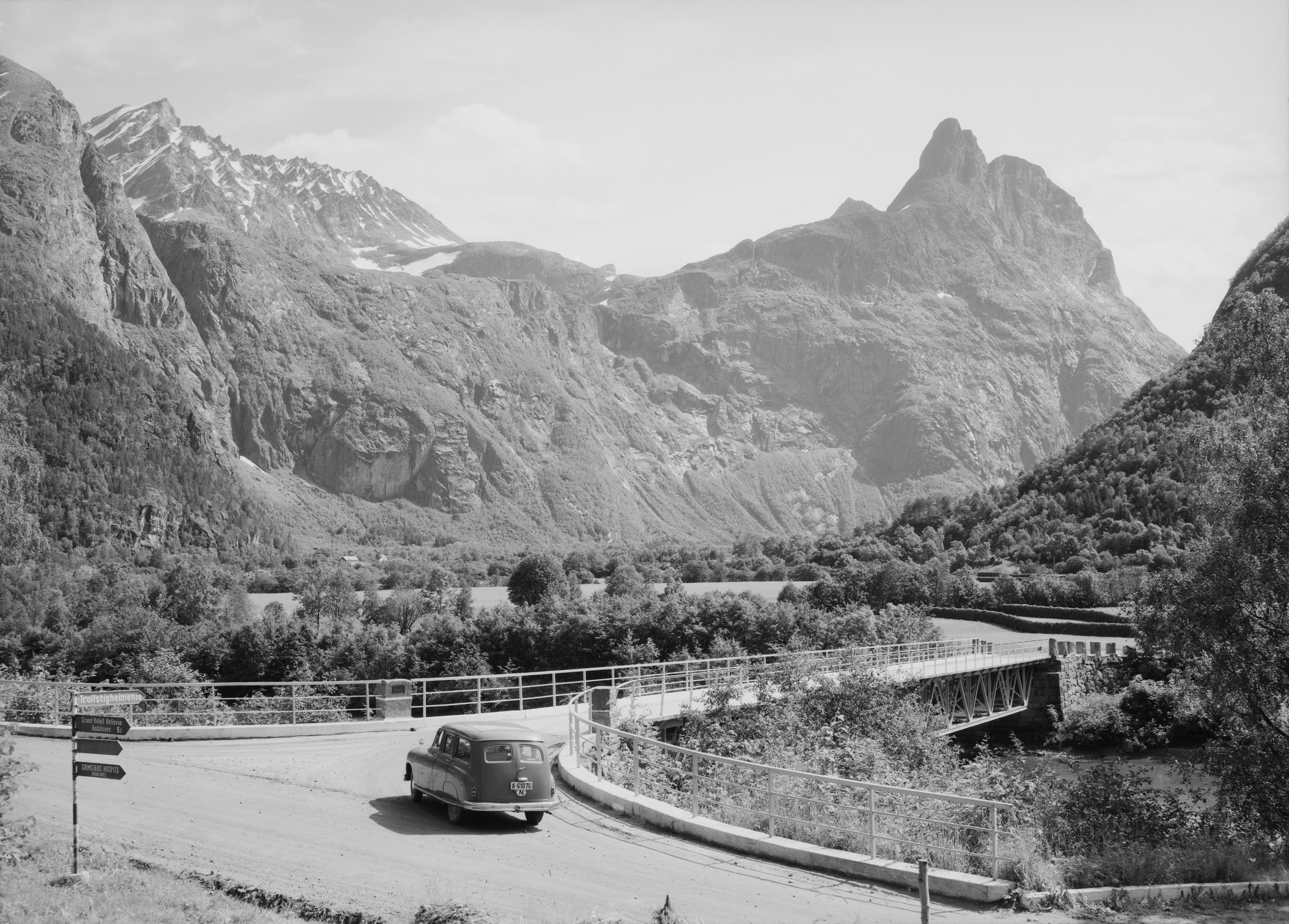 Bildet er hentet fra Nasjonalbibliotekets bildesamling Romsdalen,Romsdalshornet,Sogge bru,Venjetinden, Rauma, Møre og Romsdal